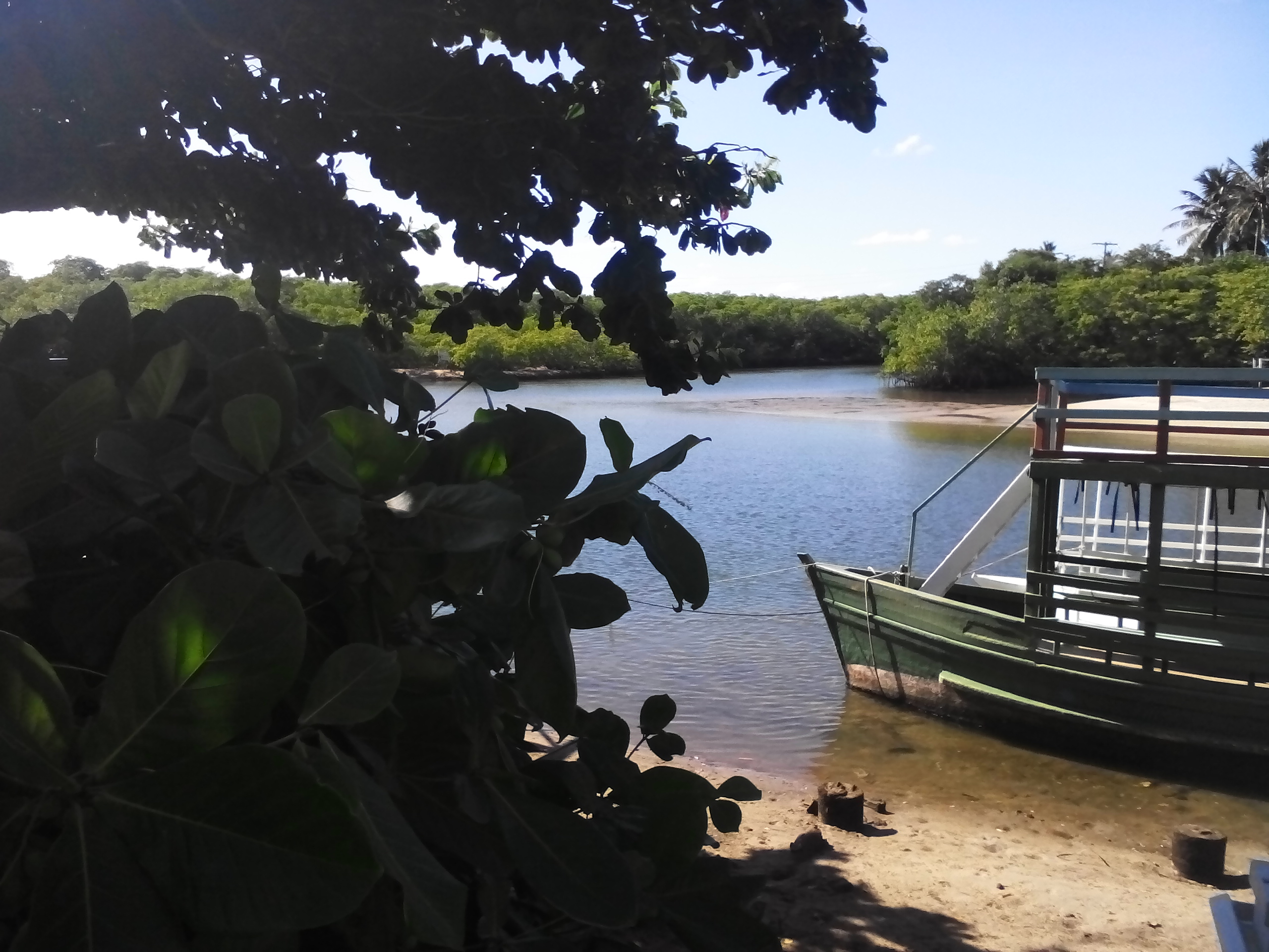 Barra de Jequiá